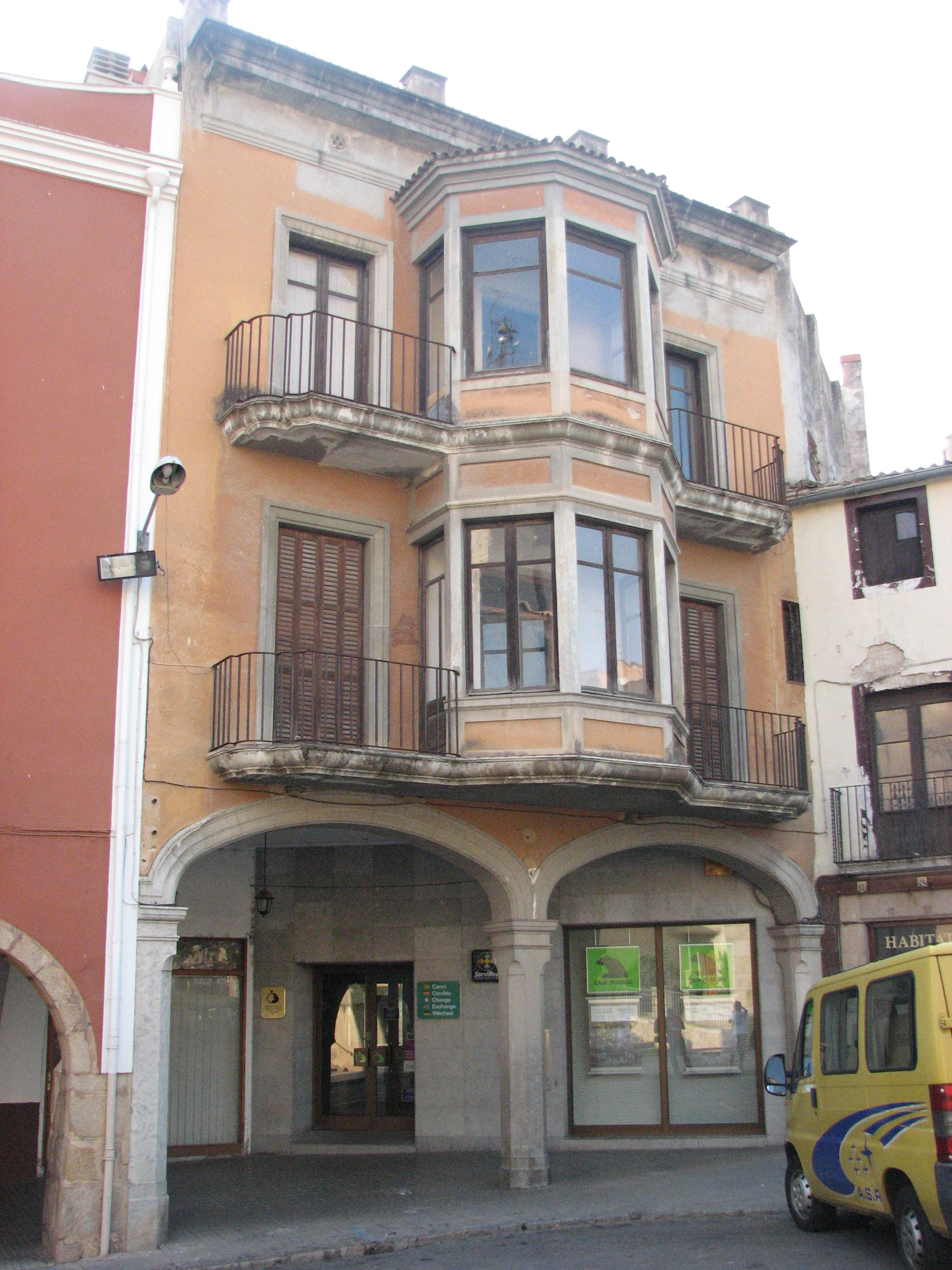 Casa a la plaça Farners, 6-7 (Santa Coloma de Farners)